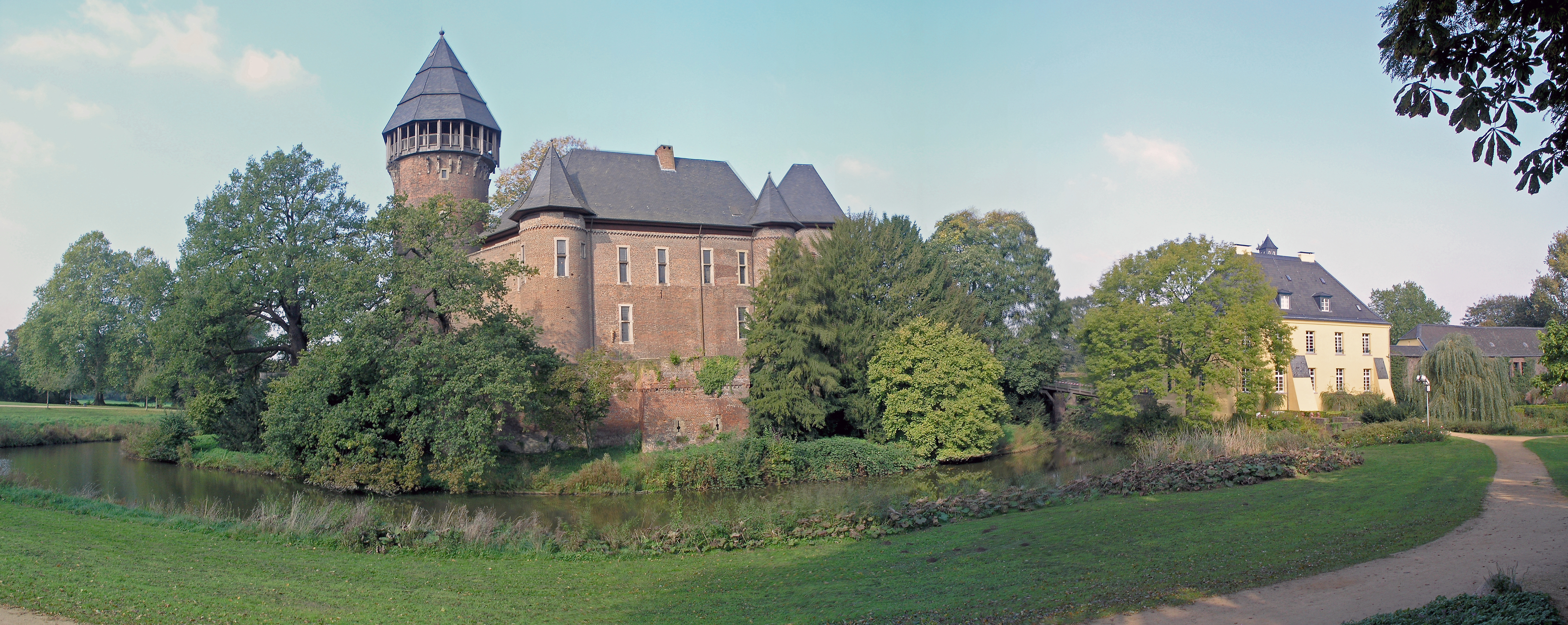 Северный Рейн-Вестфалия, Крефельд - замок Бург Линн (панорама)